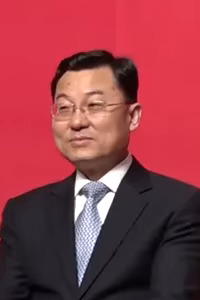 粵語: 外交部駐港特派員謝鋒